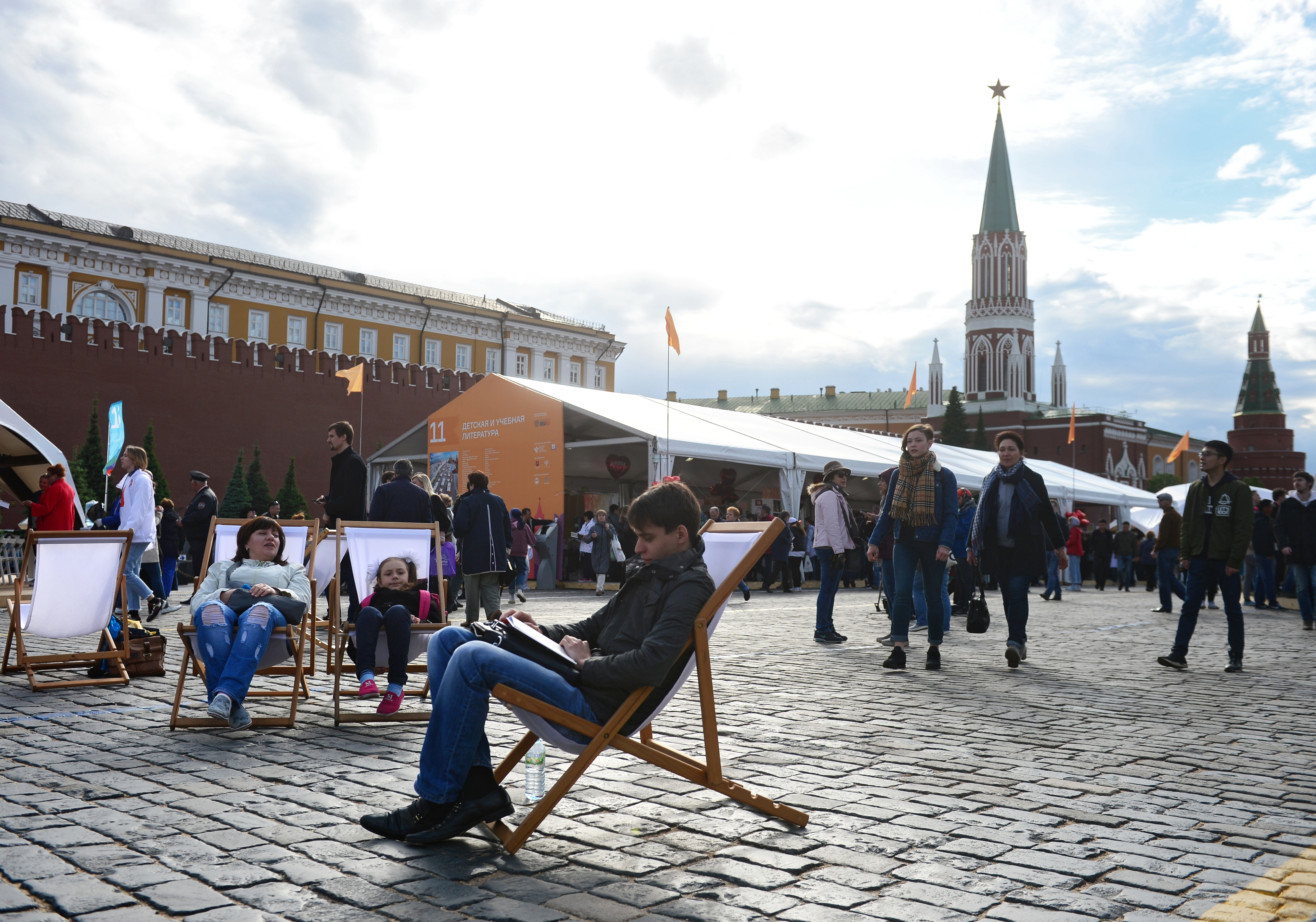 Книжный фестиваль "Красная площадь"